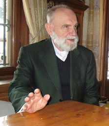 Porträt Günter Dux